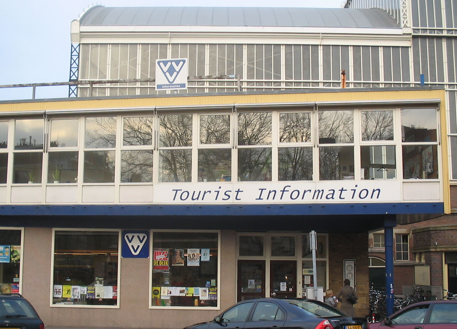 VVV vestiging Haarlem, naast het station, januari 2006